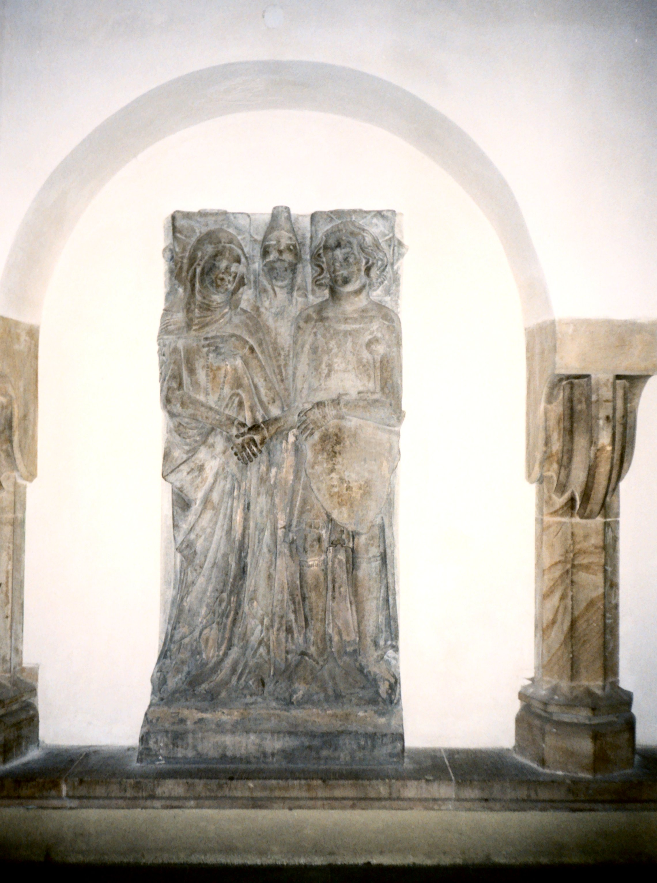 Płyta nagrobna znajdująca się w ratuszu we Lwówku Śląskim przedstawiająca pr. Agnieszkę i Henryka I Jaworskiego